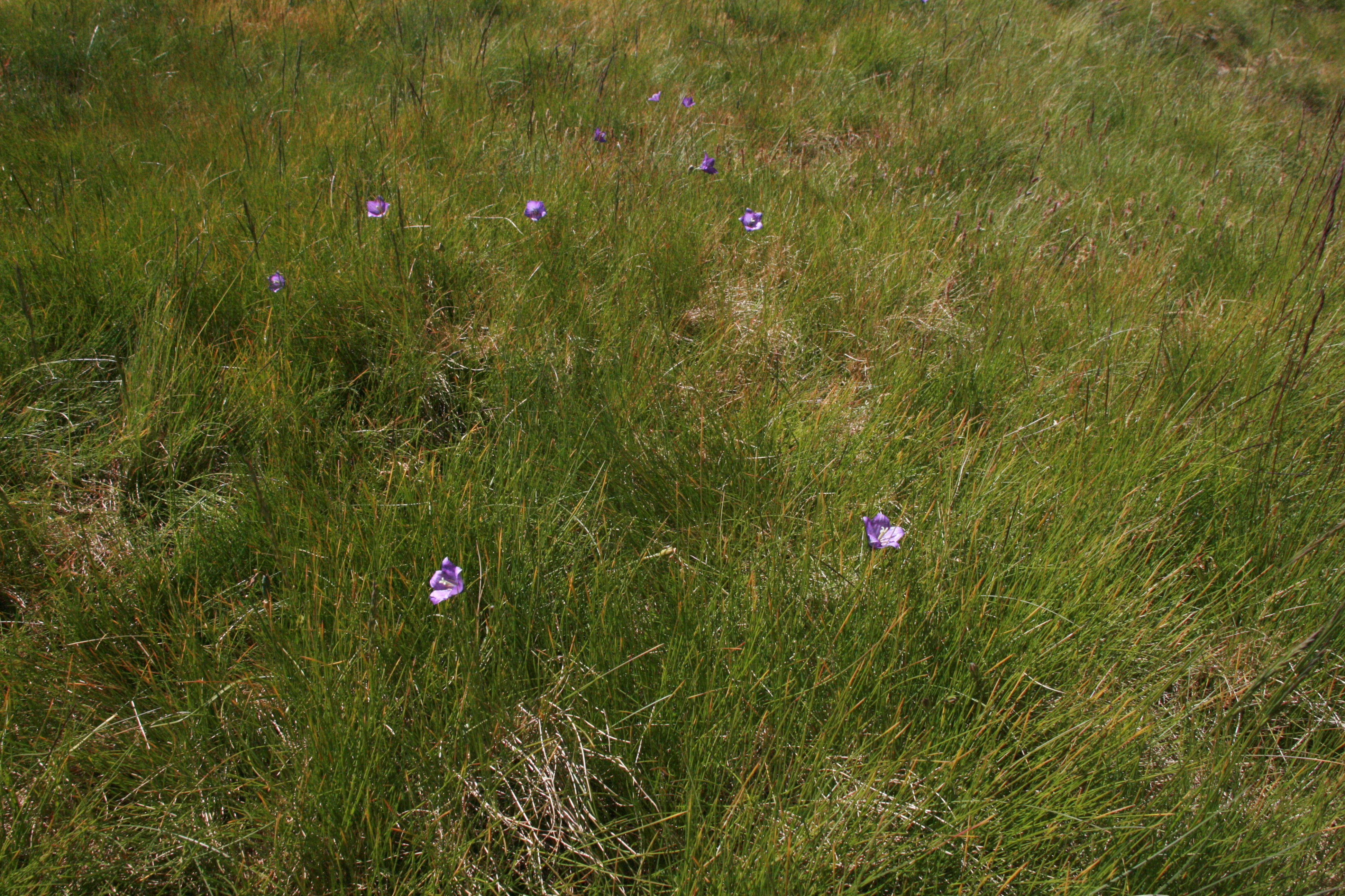 Flora en las inmediaciones de la Laguna Grande del Circo de Gredos en la Sierra de Gredos. España; (Campanula herminii)